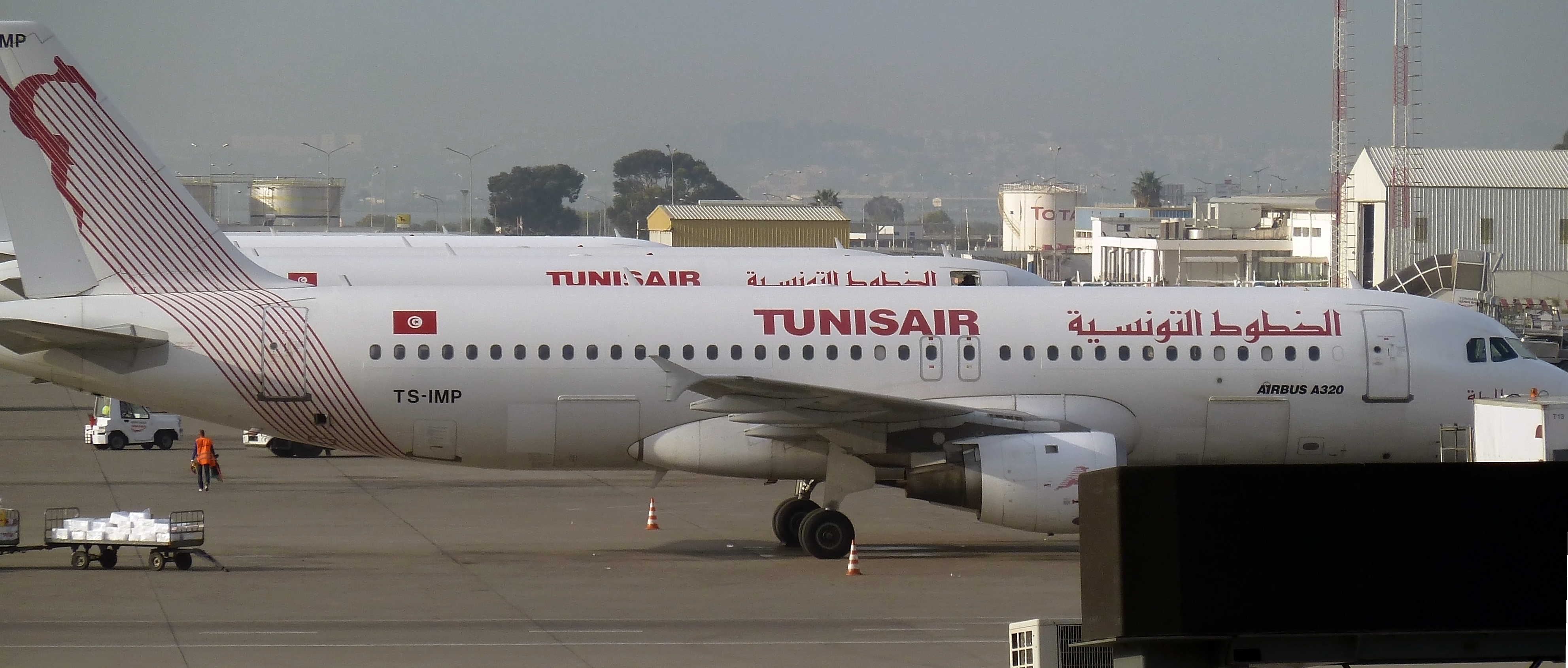 L'avion TS-IMP de Tunisair à Tunis